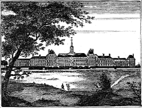 La prison-hôpital de Bicêtre au XVIIe siècle.